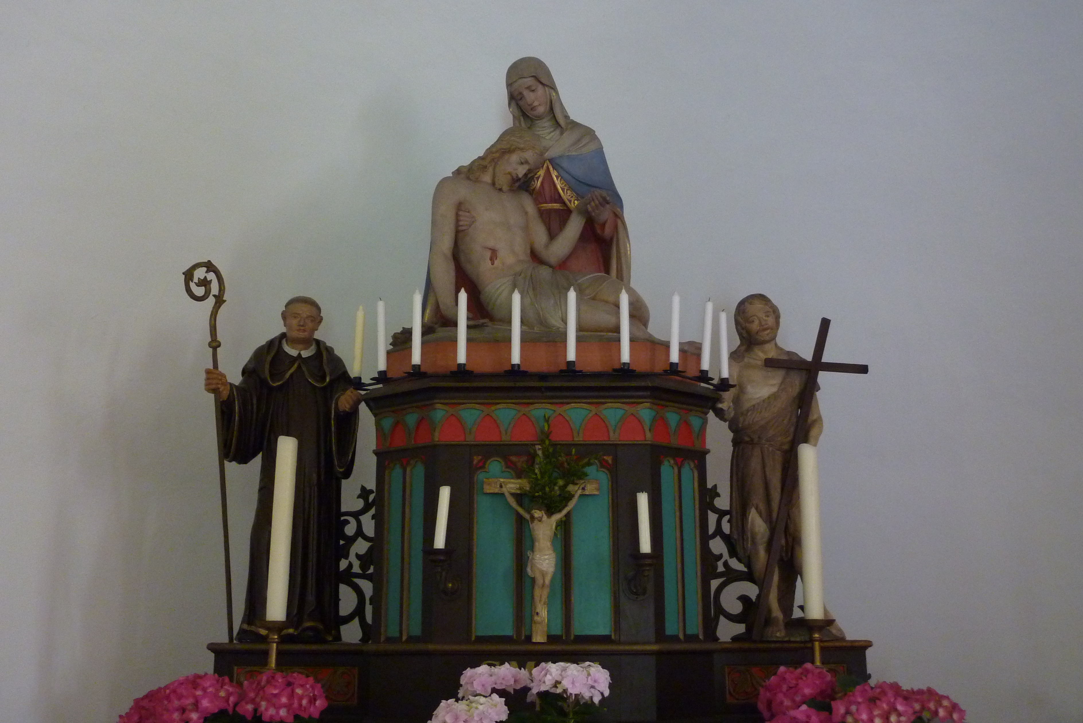 südwestlich von Borler auf dem Heyerberg: sogenannte Borler Kapelle; Altar